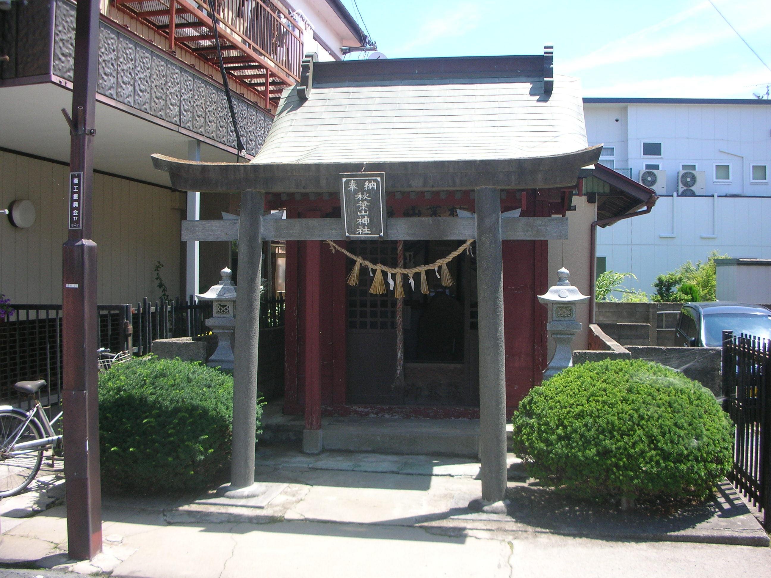 秋葉山神社